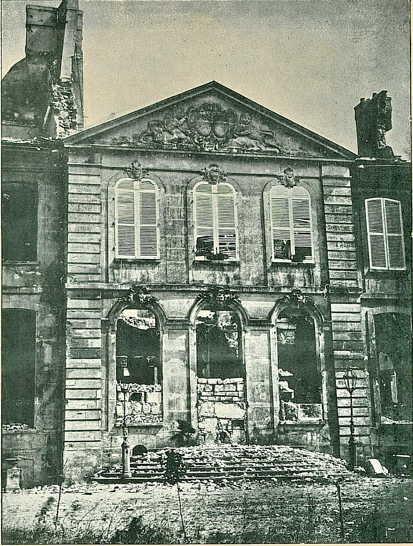 Le Château de Ladoucette à Drancy (Seine-Saint-Denis, France), après les batailles de la Guerre franco-allemande de 1870